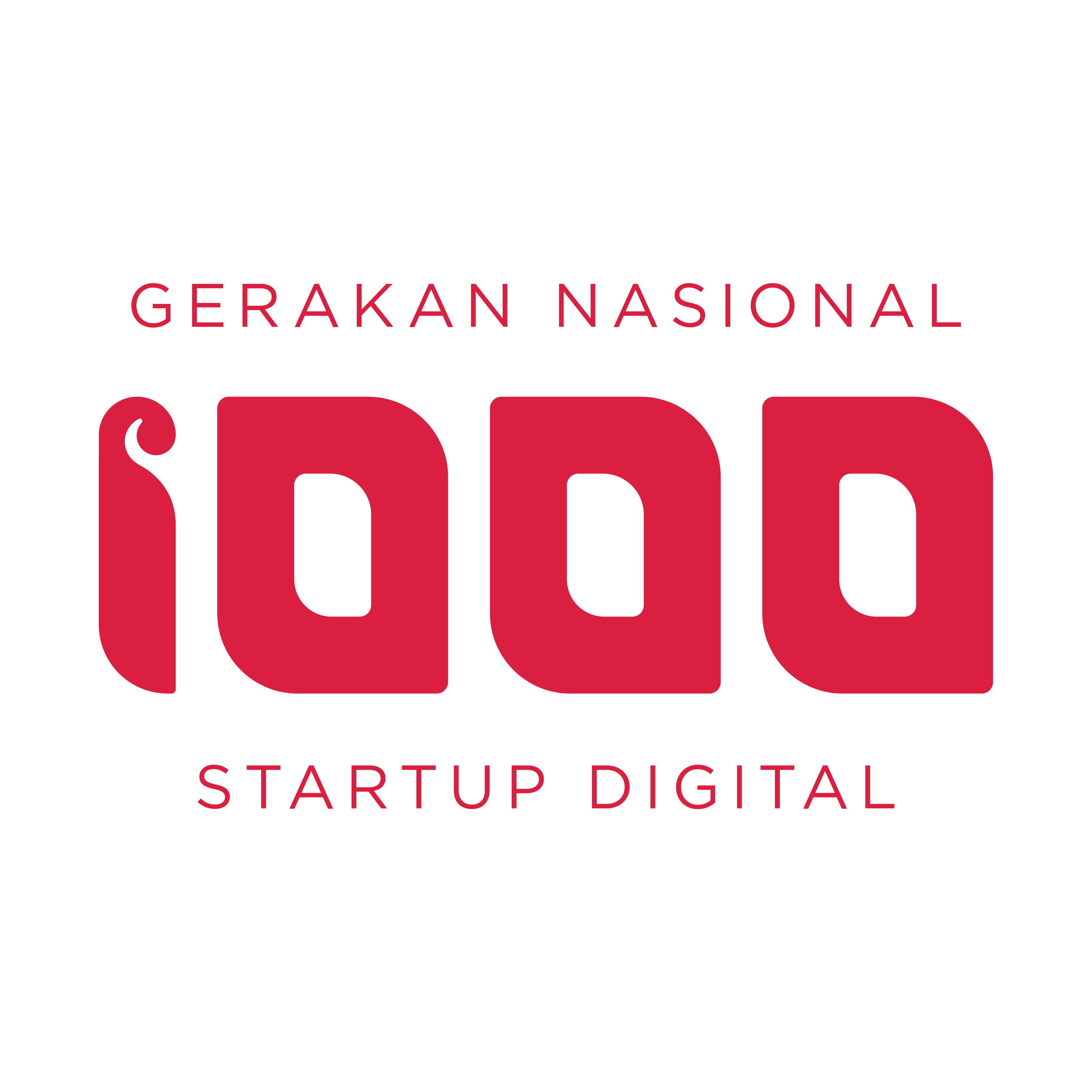 Ini adalah logo versi ketiga sejak program ini diluncurkan pada 2016.